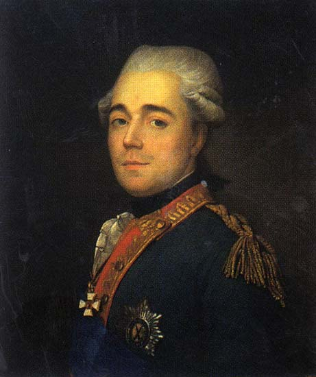 Воронцов Семен Романович Автор: Вуаль Жан Луи Источник иллюстрации: Государственный Русский музей